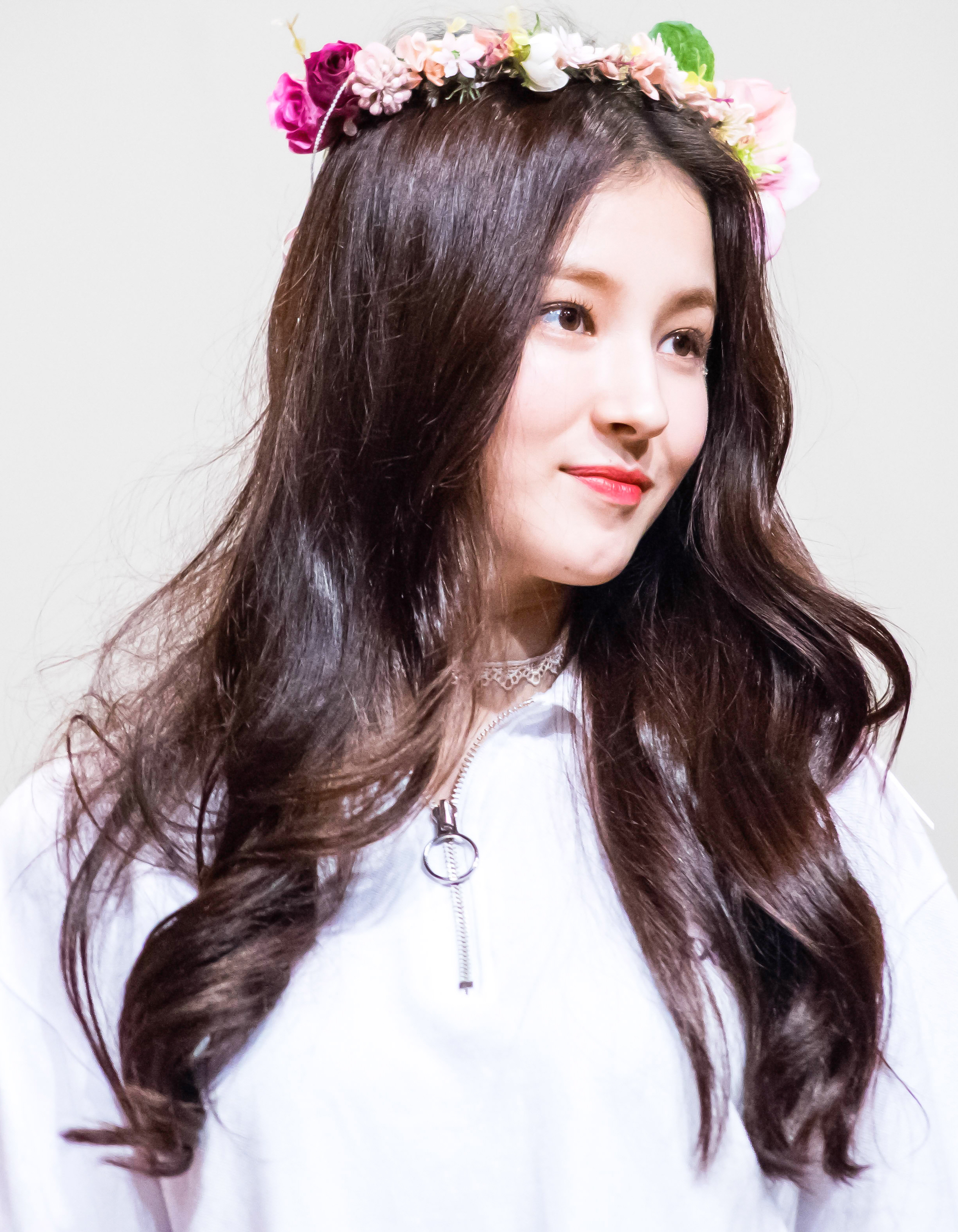 161120 건대 모모랜드 팬사인회 직찍 업로드